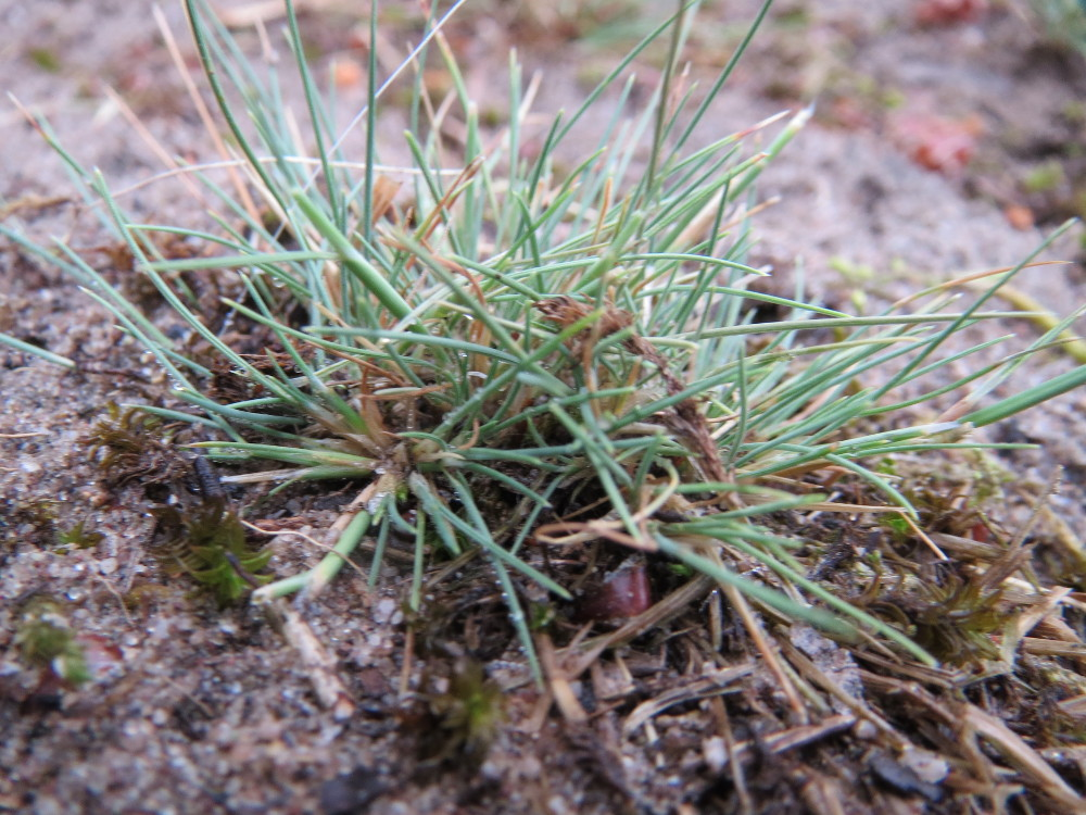 Silbergras (Corynephorus canescens) im Naturschutzgebiet Hirschacker und Dossenwald